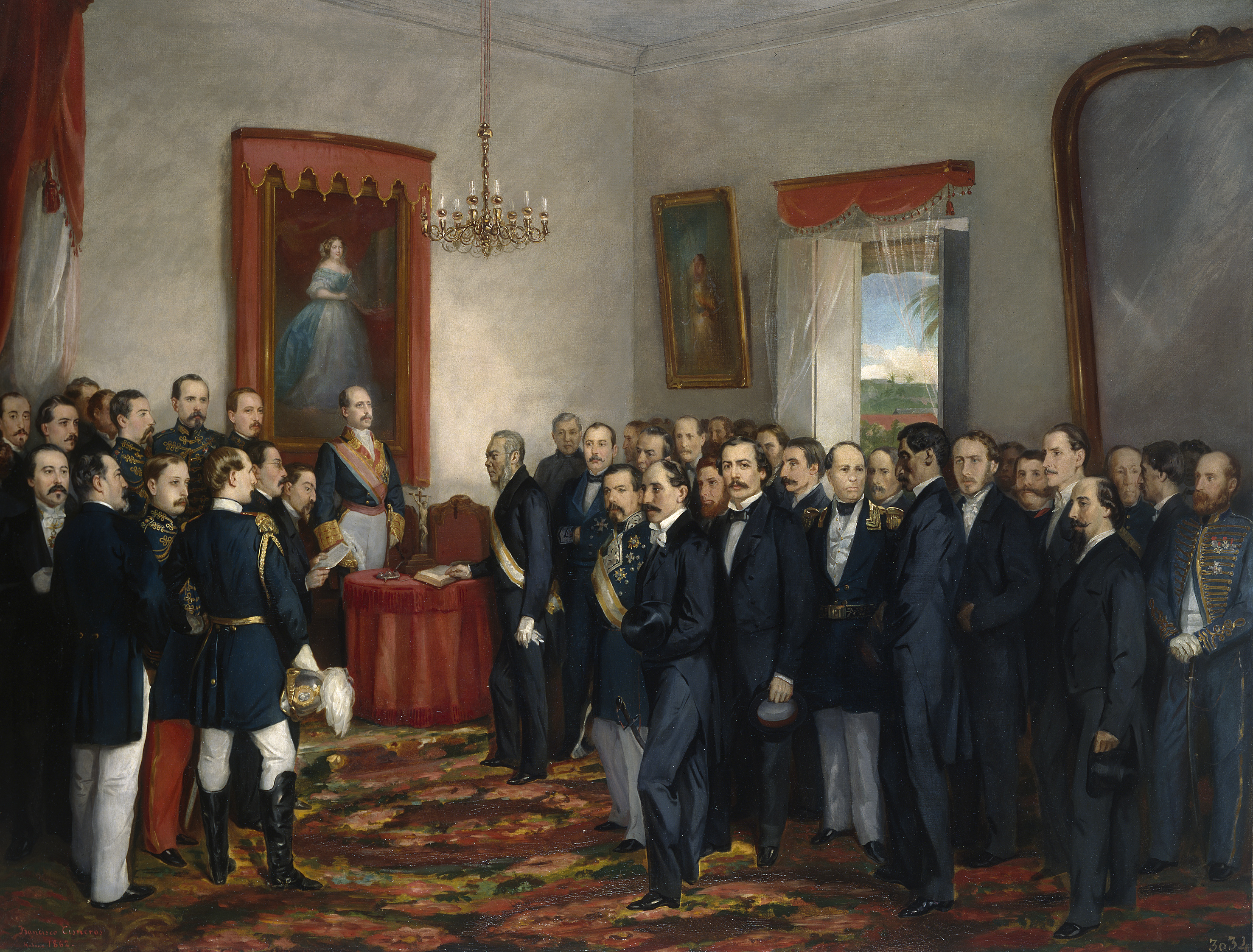 El lienzo representa el momento en que don Pedro Santana presto juramento para tomar posesión del cargo de gobernador y de capitán general de la Isla de Santo Domingo..